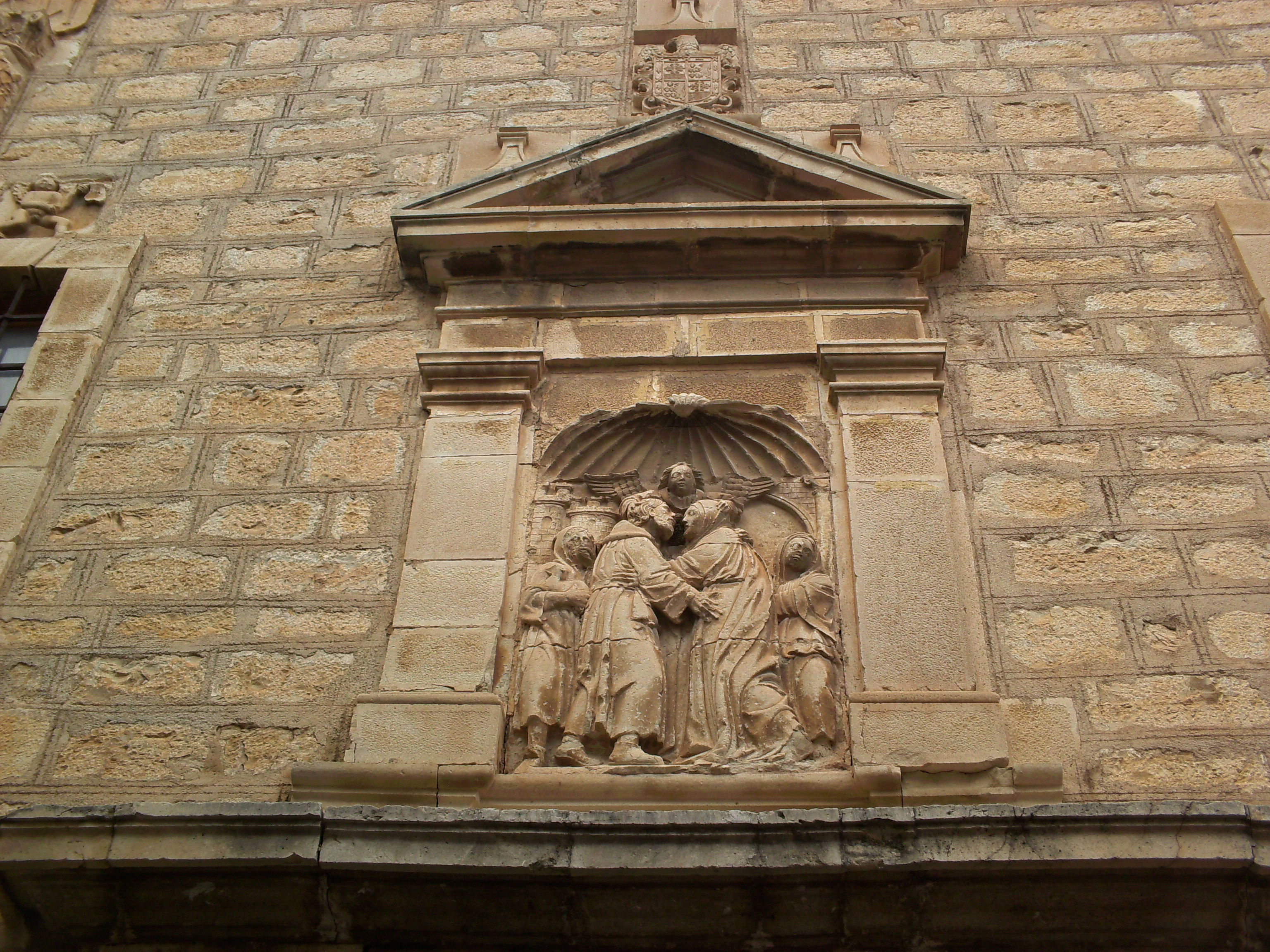 Escena del Encuentro en la Puerta Dorada de la fachada situada en la calle Rostro de la iglesia de San Andrés, en Jaén.